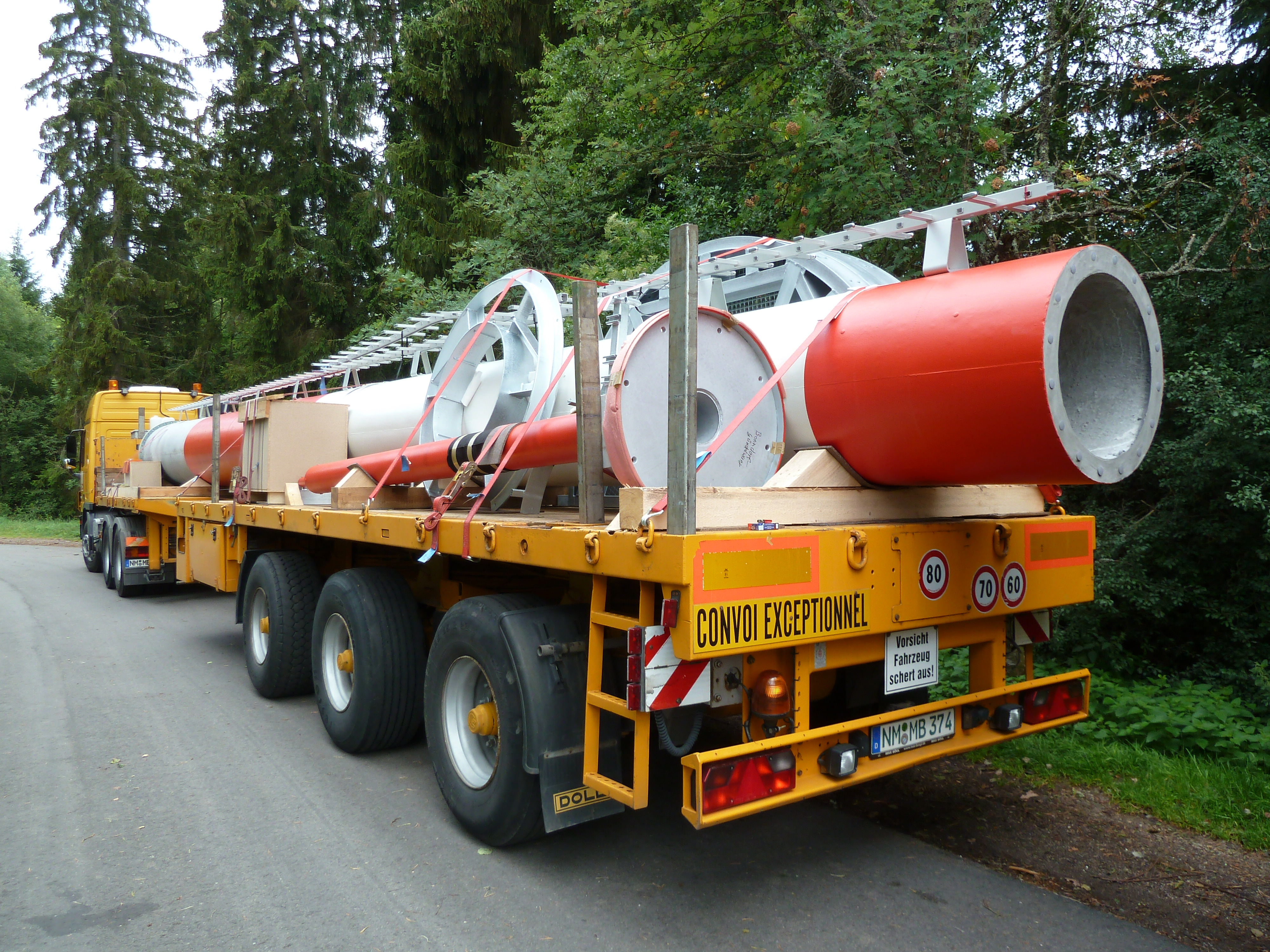 Zerlegter Handymast für den Aufbau in Gündelwangen, Baden-Württemberg, Deutschland